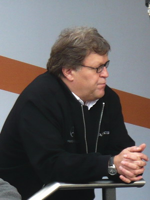 Norbert Haug bei stars and cars 2007 Stuttgart